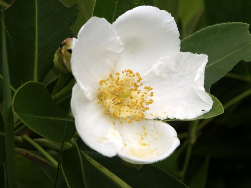 Gordonia in Tiger Creek Preserve, Polk Co., FL